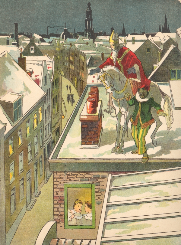 Sint Nicolaas en zijn knecht / door J. Schenkman ; [geïllustreerd door P. van Geldorp]. - [Herdr.]. - Amsterdam : J. Vlieger, [ca. 1907]. - [36] p. : gekl. lithogr. ; 32 cm